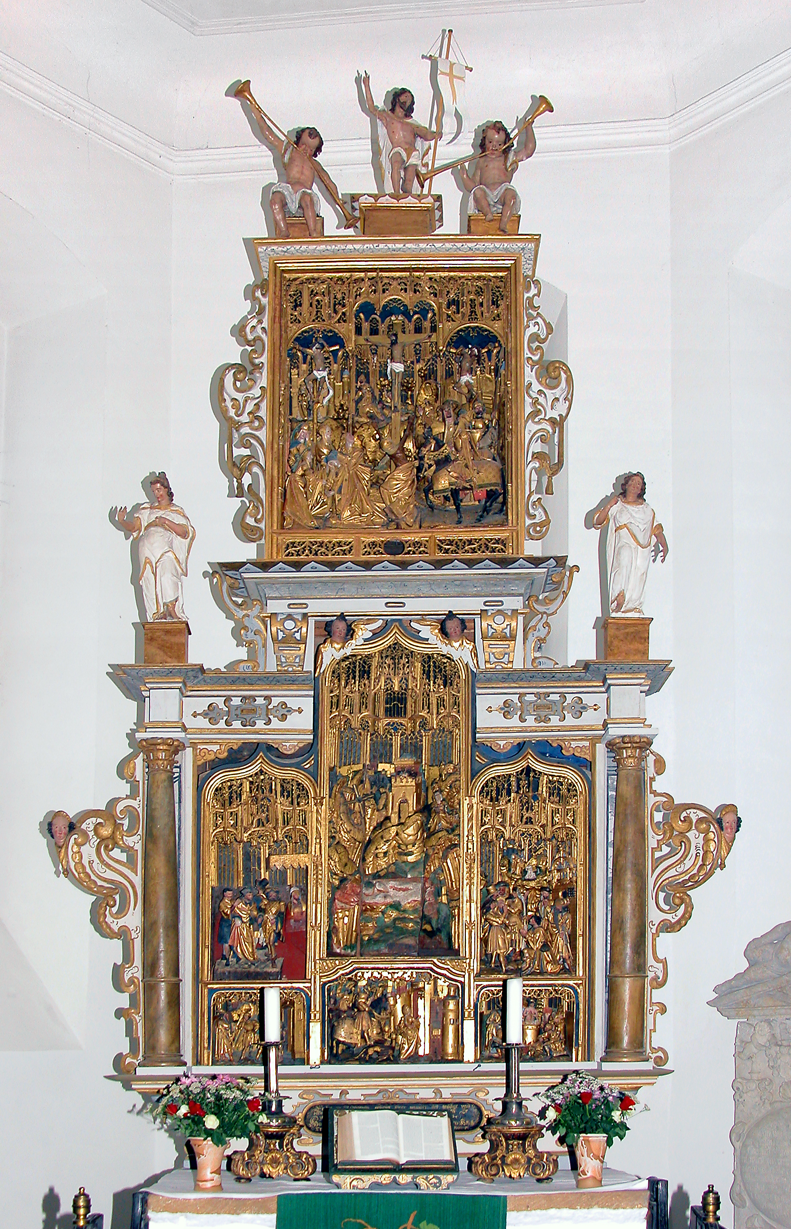 16.10.2006 01990 Großkmehlen): Pfarrkirche St. Georg (1716-1718 auf gotischem Kern). Niederländischer Schnitzaltar um 1620, aus zwei spätgotischen Schreinaltären von 1500 zu- sammengesetzt. [DSCN12037.TIF]20061016065DR.JPG(c)Blobelt